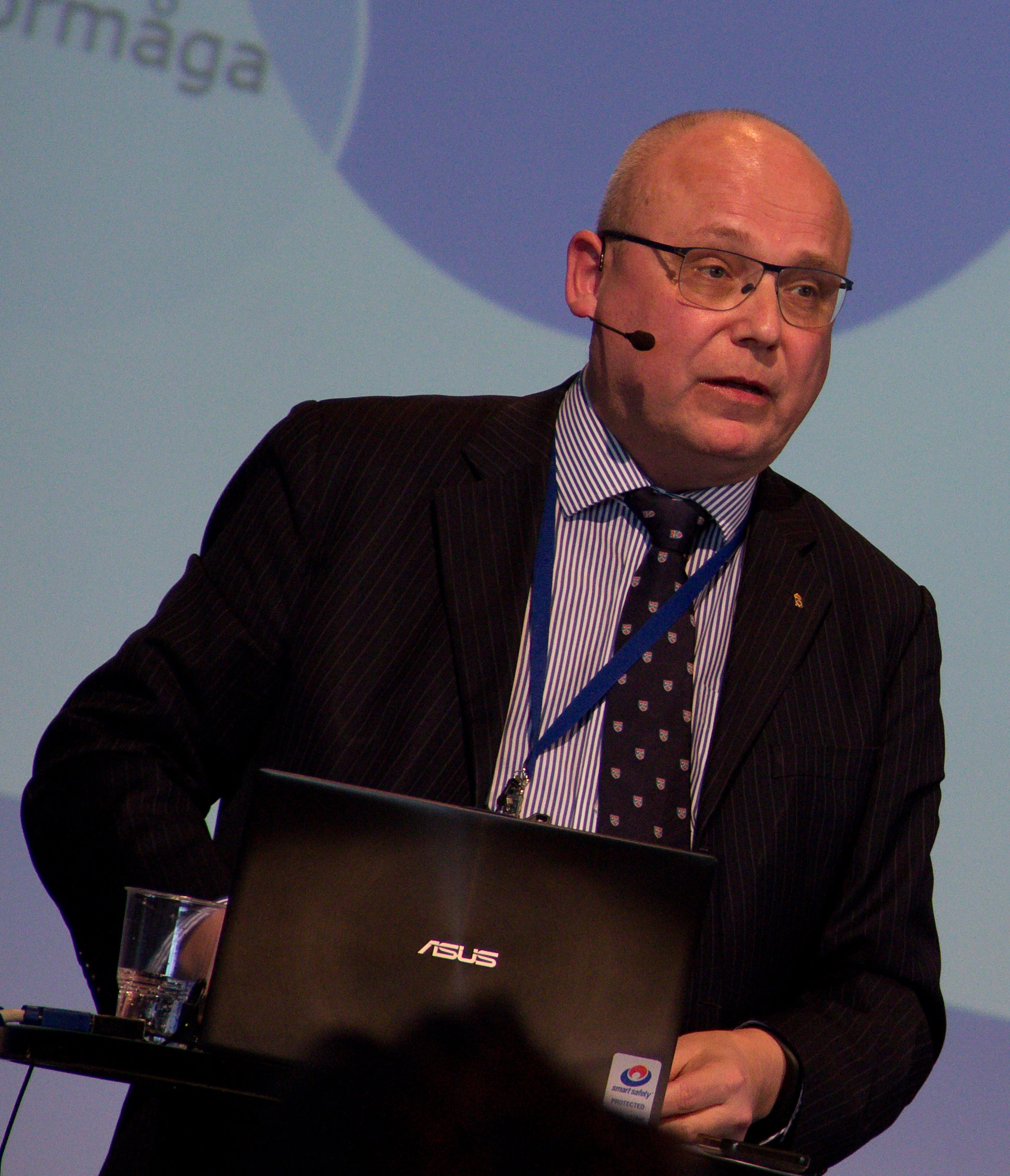 Terrorforskaren Magnus Ranstorp.